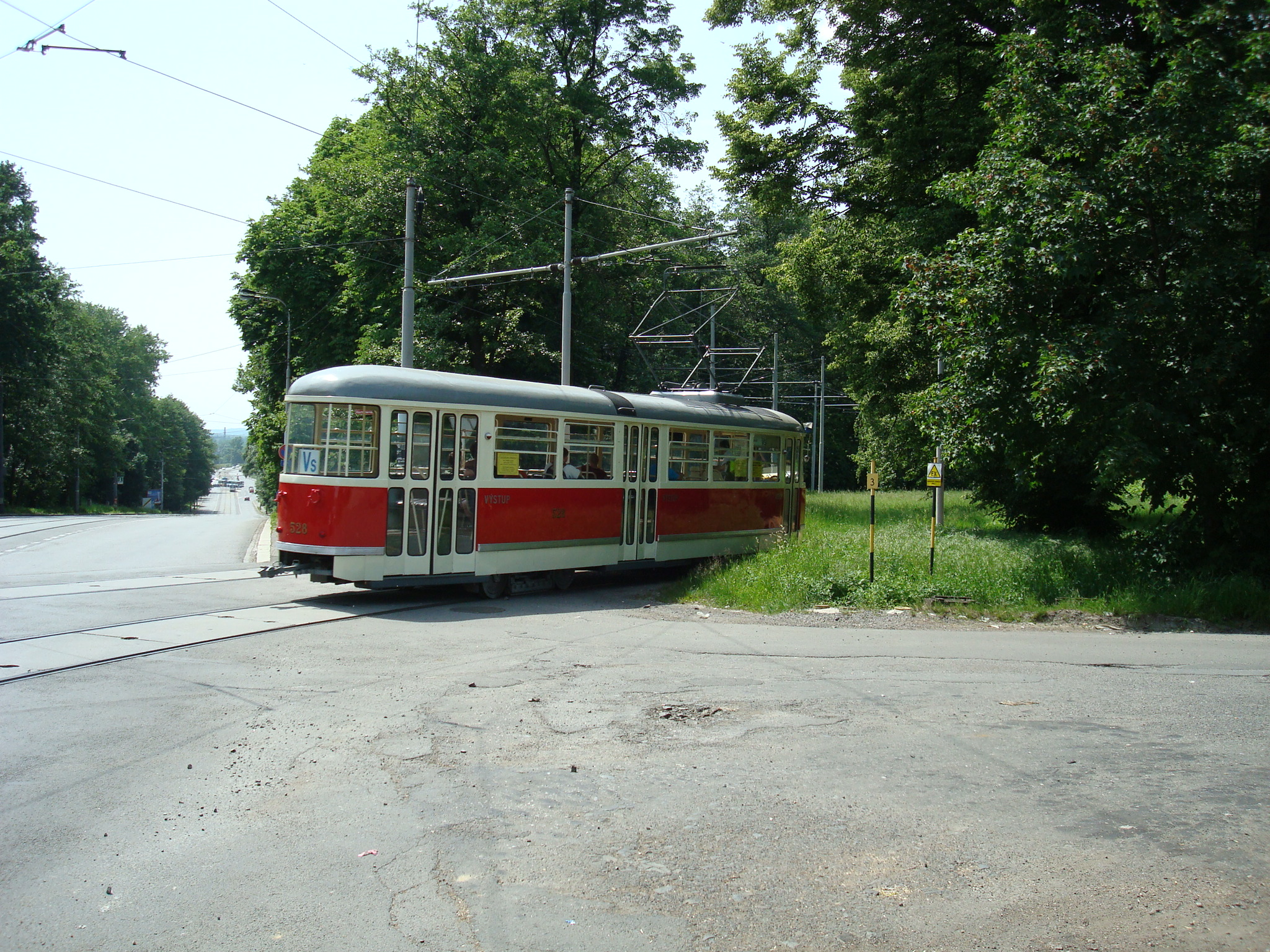 Historická tramvaj Tatra T1 v Ostravě